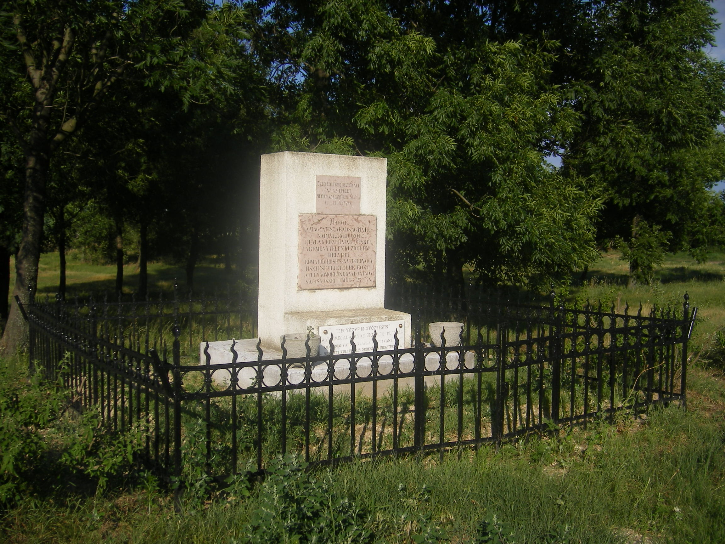 Komárom-Herkálypuszta - Az 1849-ben a komáromi vár védői és ostromlói közötti fegyverszünet aláírásának emlékműve